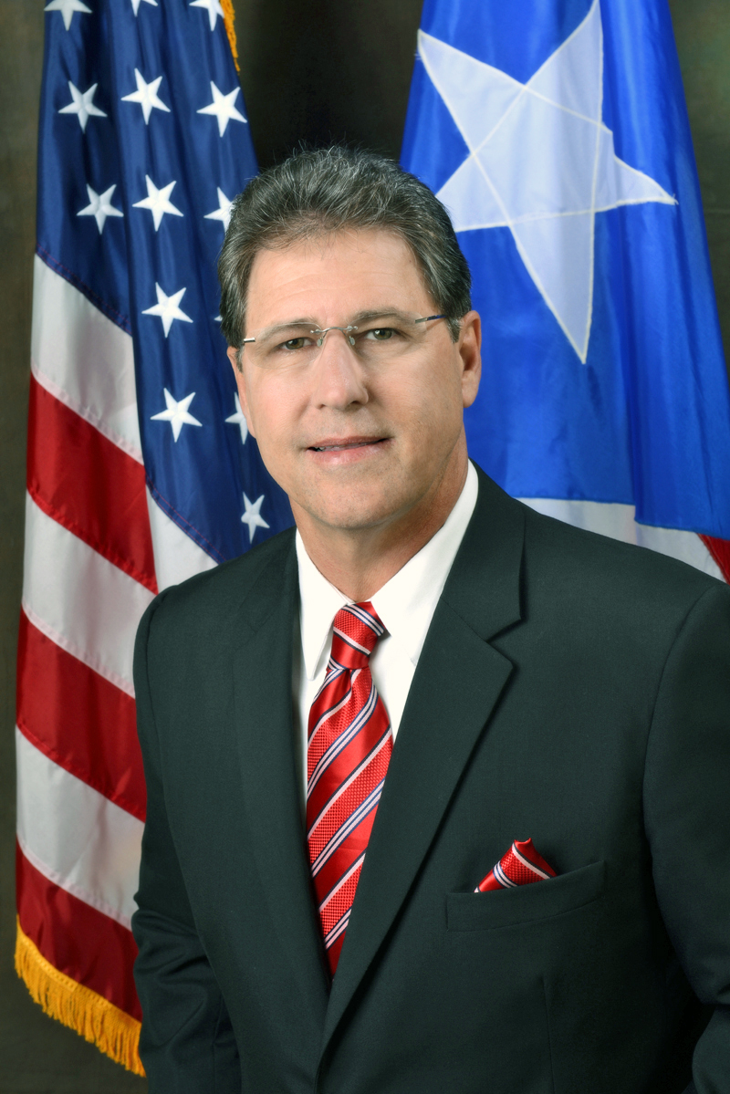 Alcalde de Cabo Rojo Hon. Roberto José Ramírez Kurtz